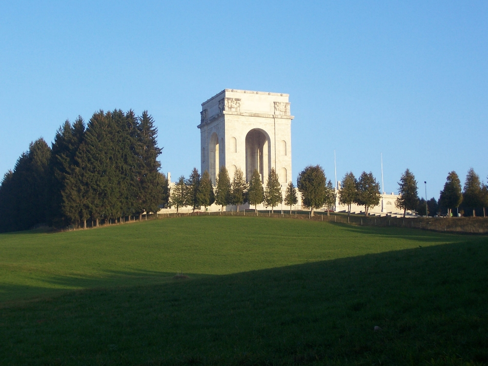 Ossario caduti di Asiago